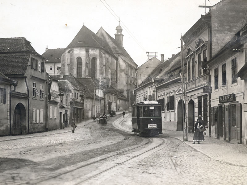 Biserica ursulinelor, Str. General Magheru